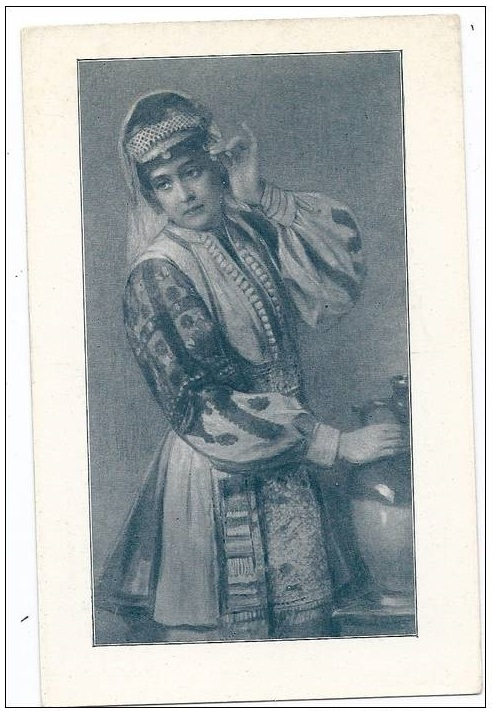 Гостиварска женска носия